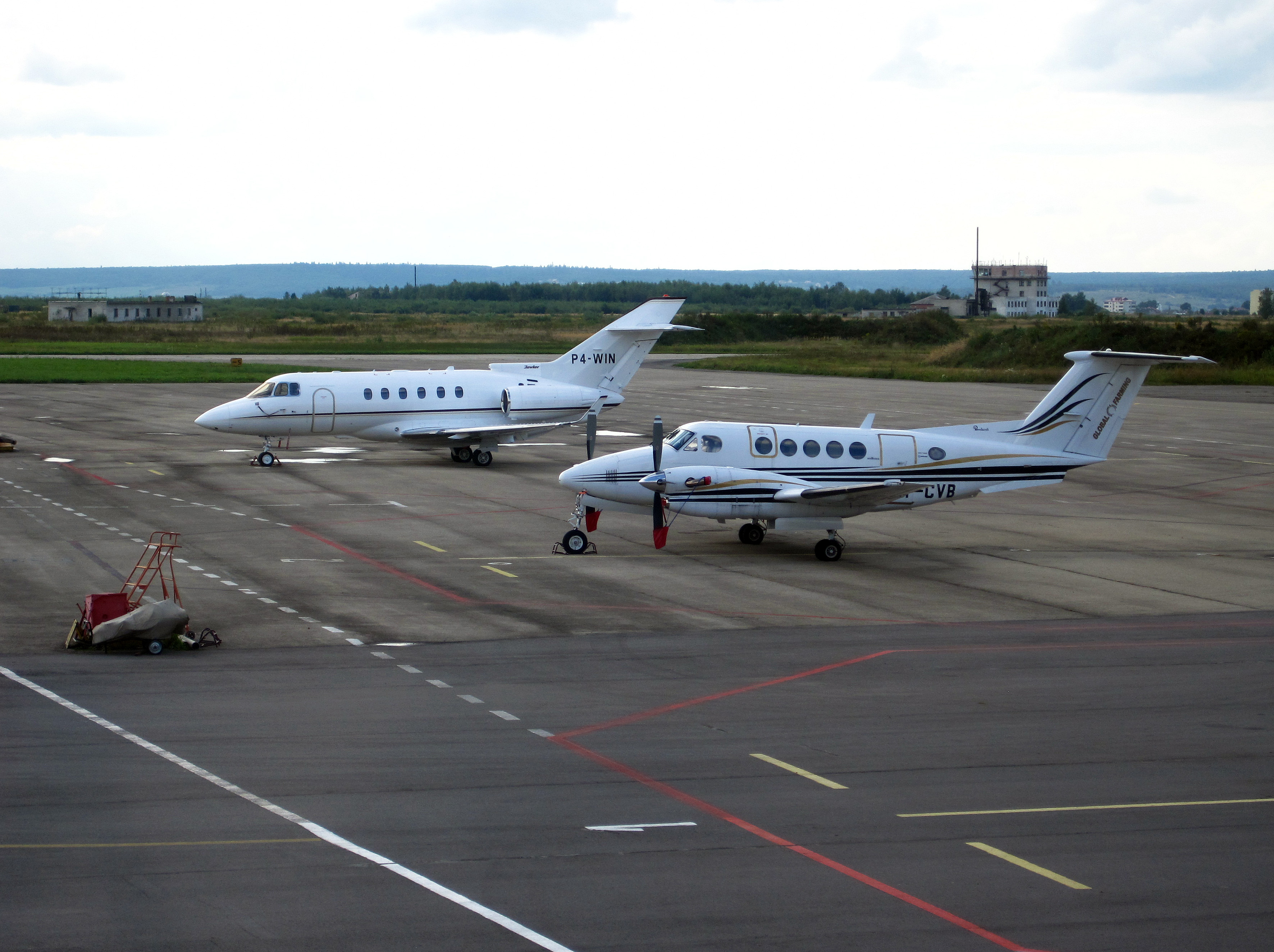 Івано-Франківськ (аеропорт) літаки